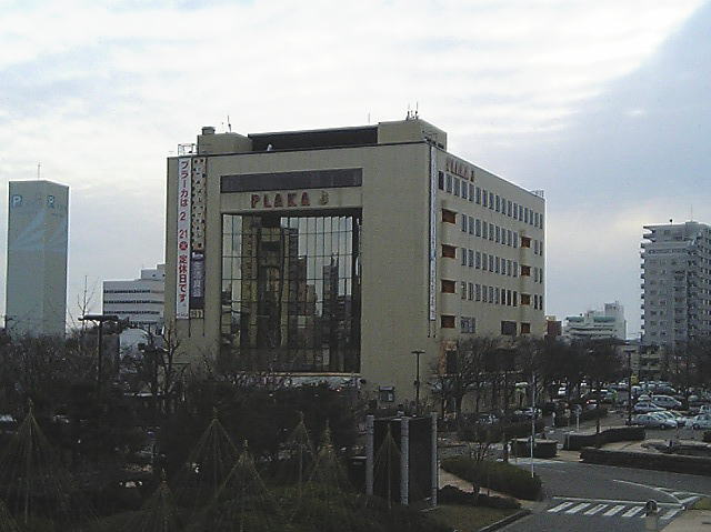 新潟市天神、プラーカ3